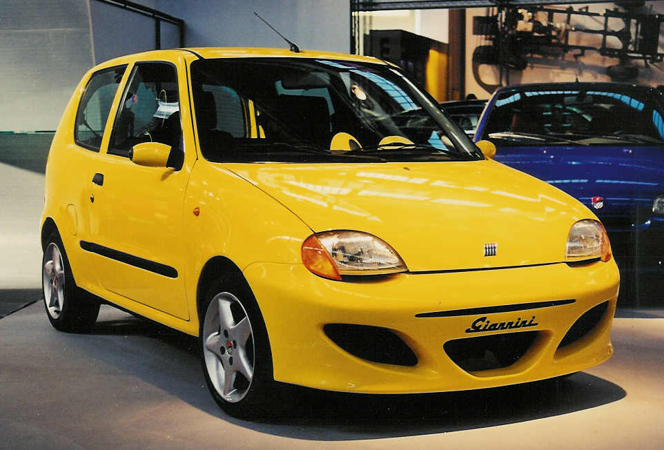 Immagine gentilmente donata dal Dottor Gabriele Polverelli-Giannini Automobili S.p.A. OTRS tkt #2006011610004435